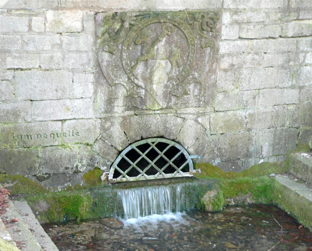 Quelle der Lamme im Klosterpark in Lamspringe